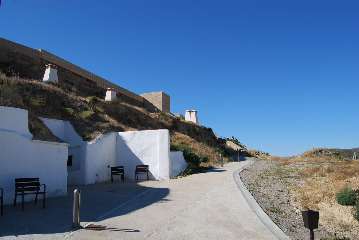 Vista del acceso al Castillo de Nogalte